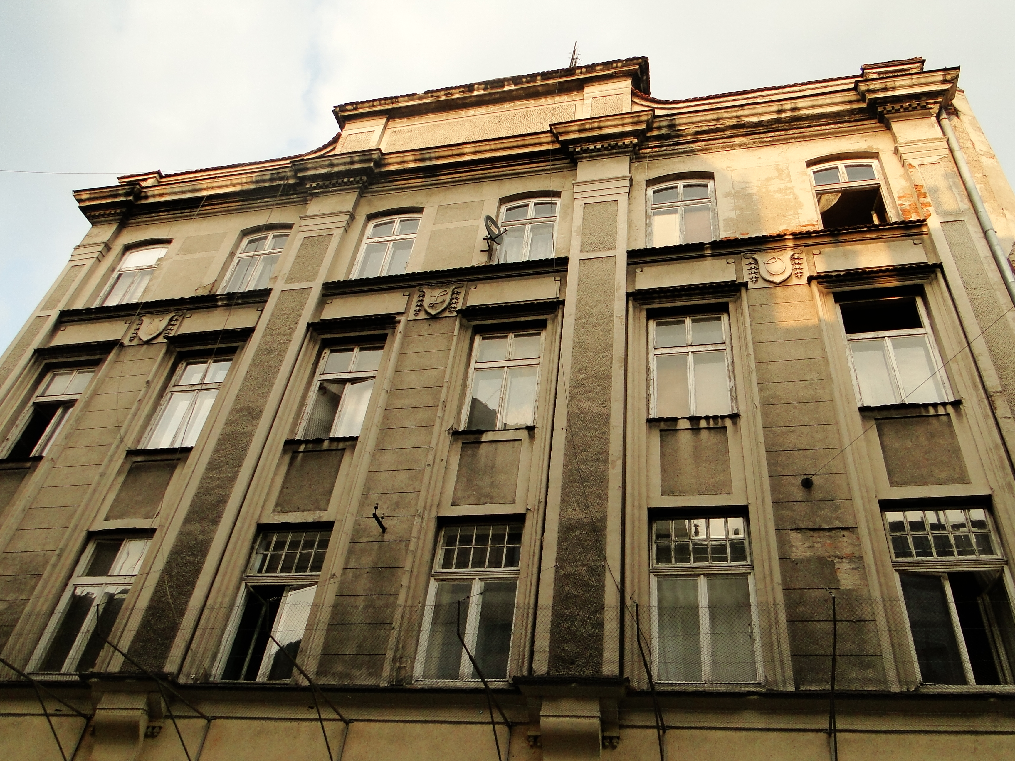 dom, ul. św. Agnieszki 10, Kraków